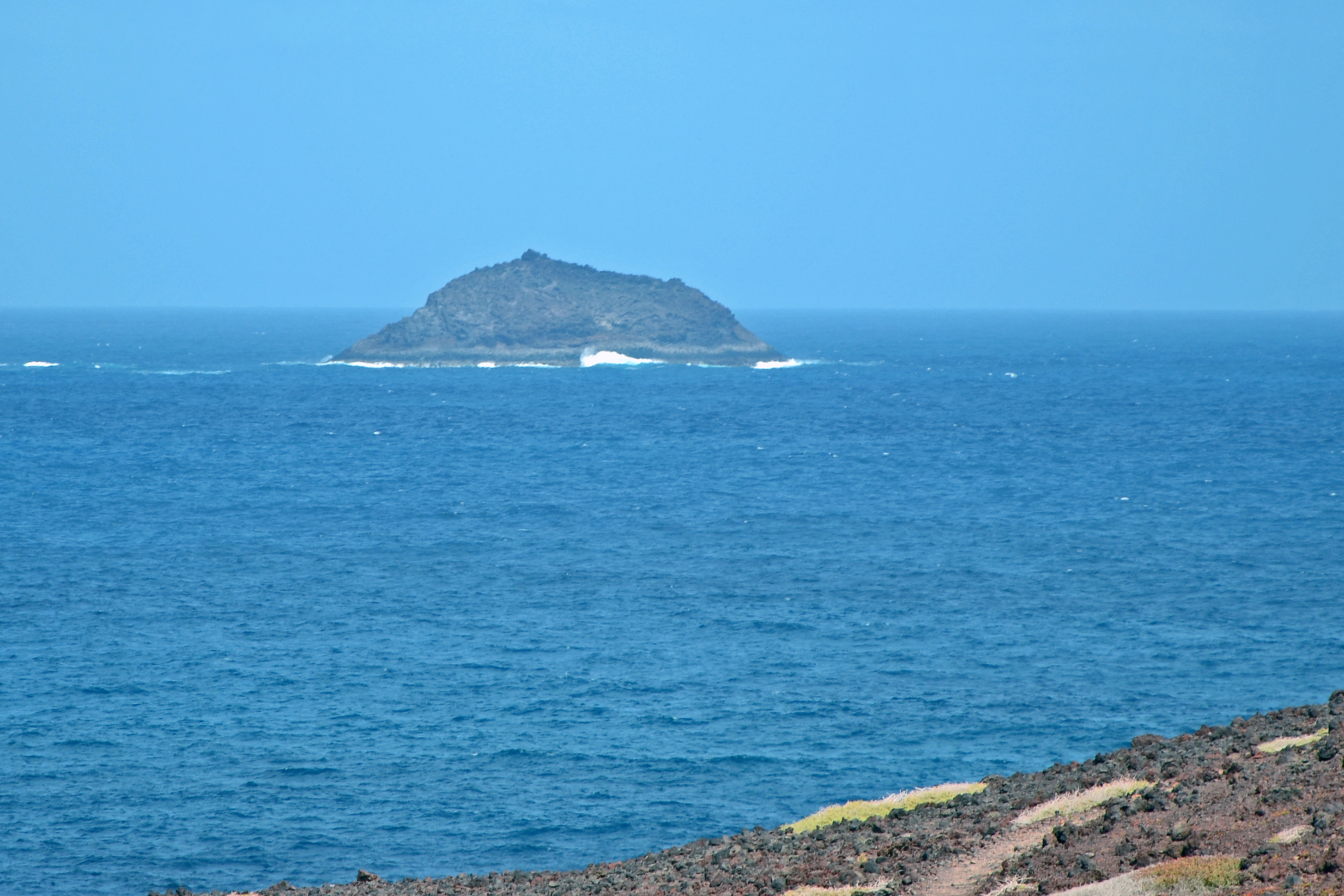 Roque del Oeste, kleine unbewohnte Kanareninsel im Chinijo-Archipel vor der Kanaren-Insel Lanzarote